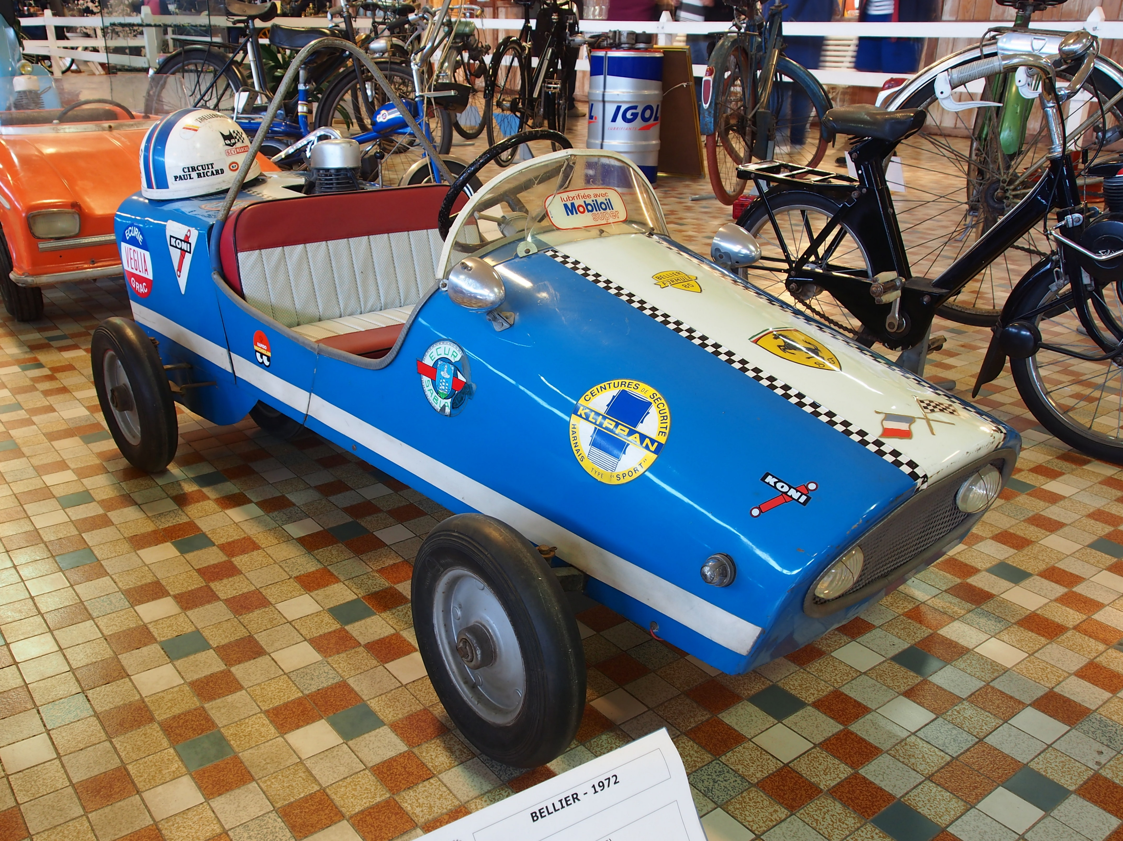 Photographed at the Musée Automobile de Vendée, France.